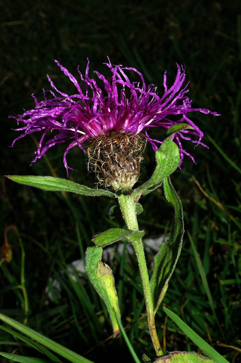 Peresasti glavinec na Viševniku.